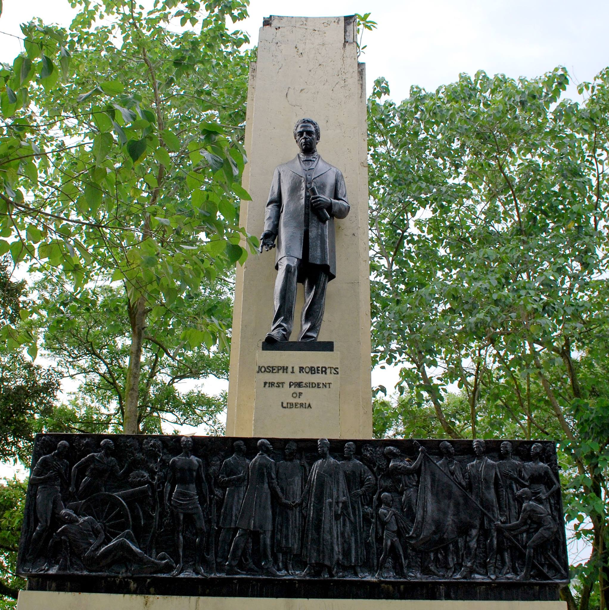 Liberia